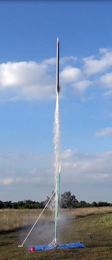 5,3 liter űrtartalmú, egyterű vízrakéta kilövésének a pillanata. Látható az indítóállvány, annak részeként az indítócső (zöld cső), valamint a vízrakétából kilövellő vízsugár, amely a vízrakétát több, mint 200 km/h sebességre gyorsította fel. A kép Budapest közelében készült